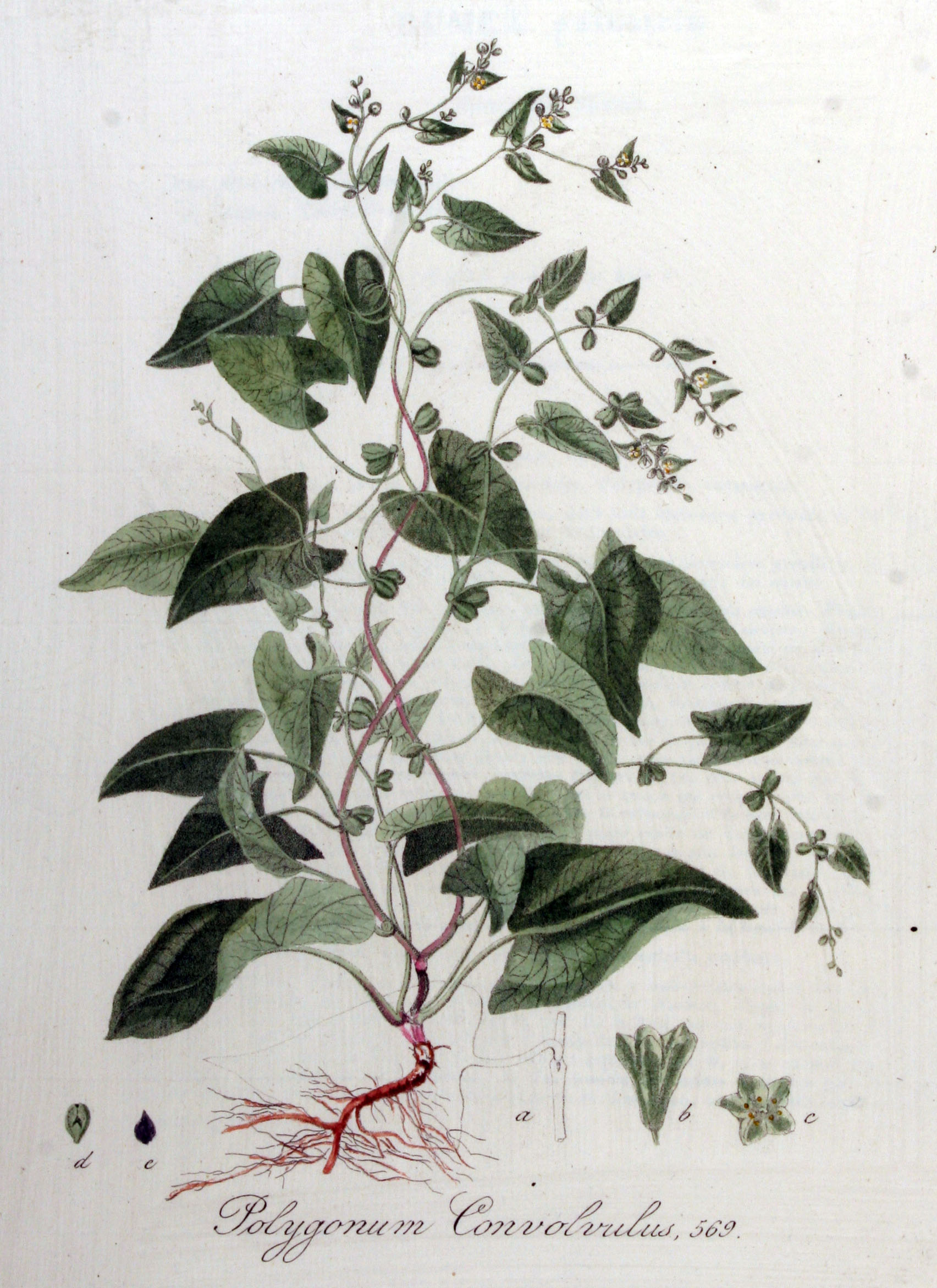 Fallopia convolvulus (L.) Á. Löve (Syn. Polygonum convolvulus L.)